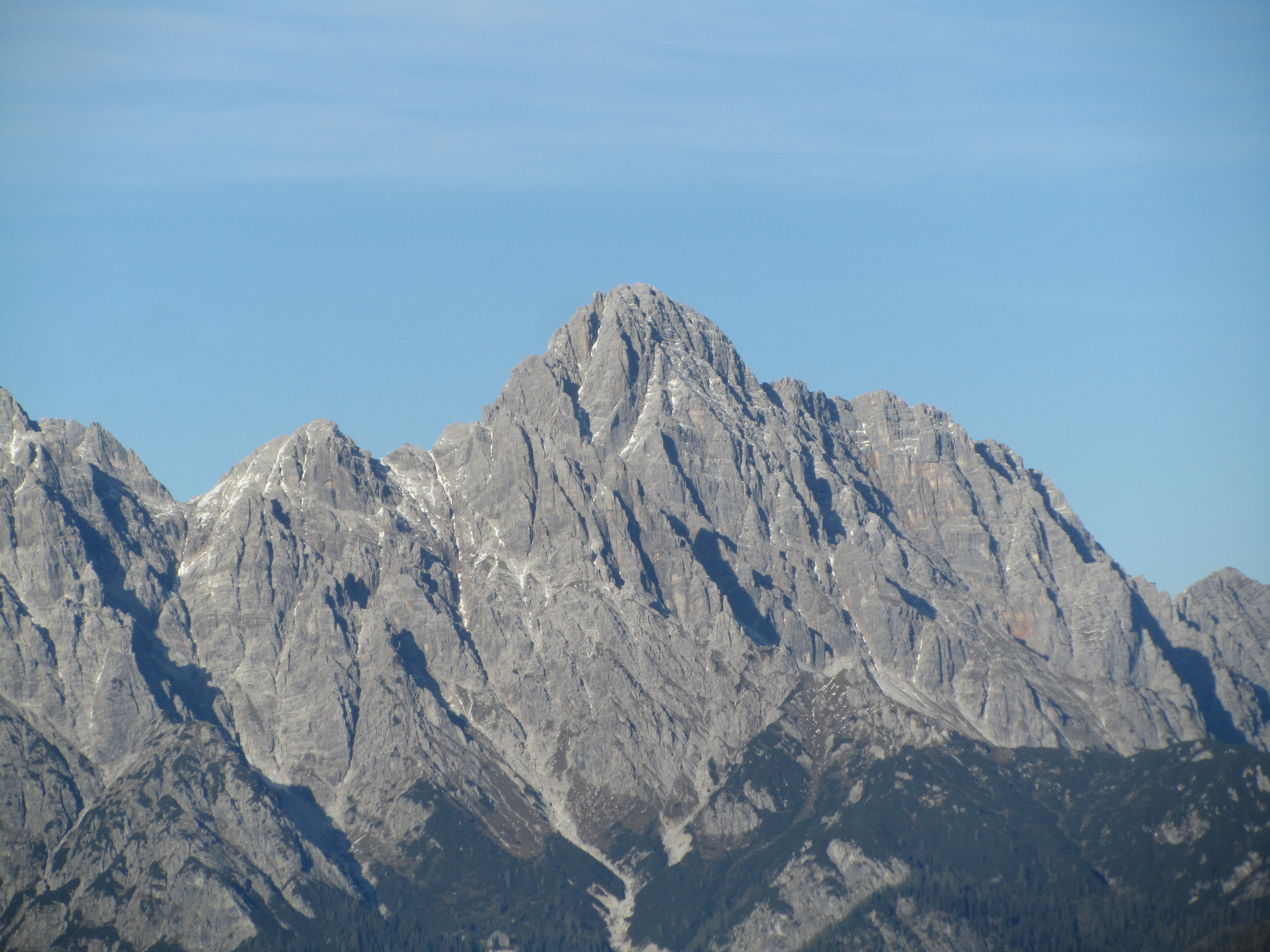 Das Große Ochsenhorn in den Loferer Steinbergen von Süden, aufgenommen vom Lärchfilzkogel